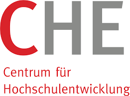 CHE ranking 로고